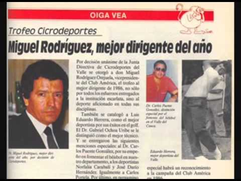 Prensa